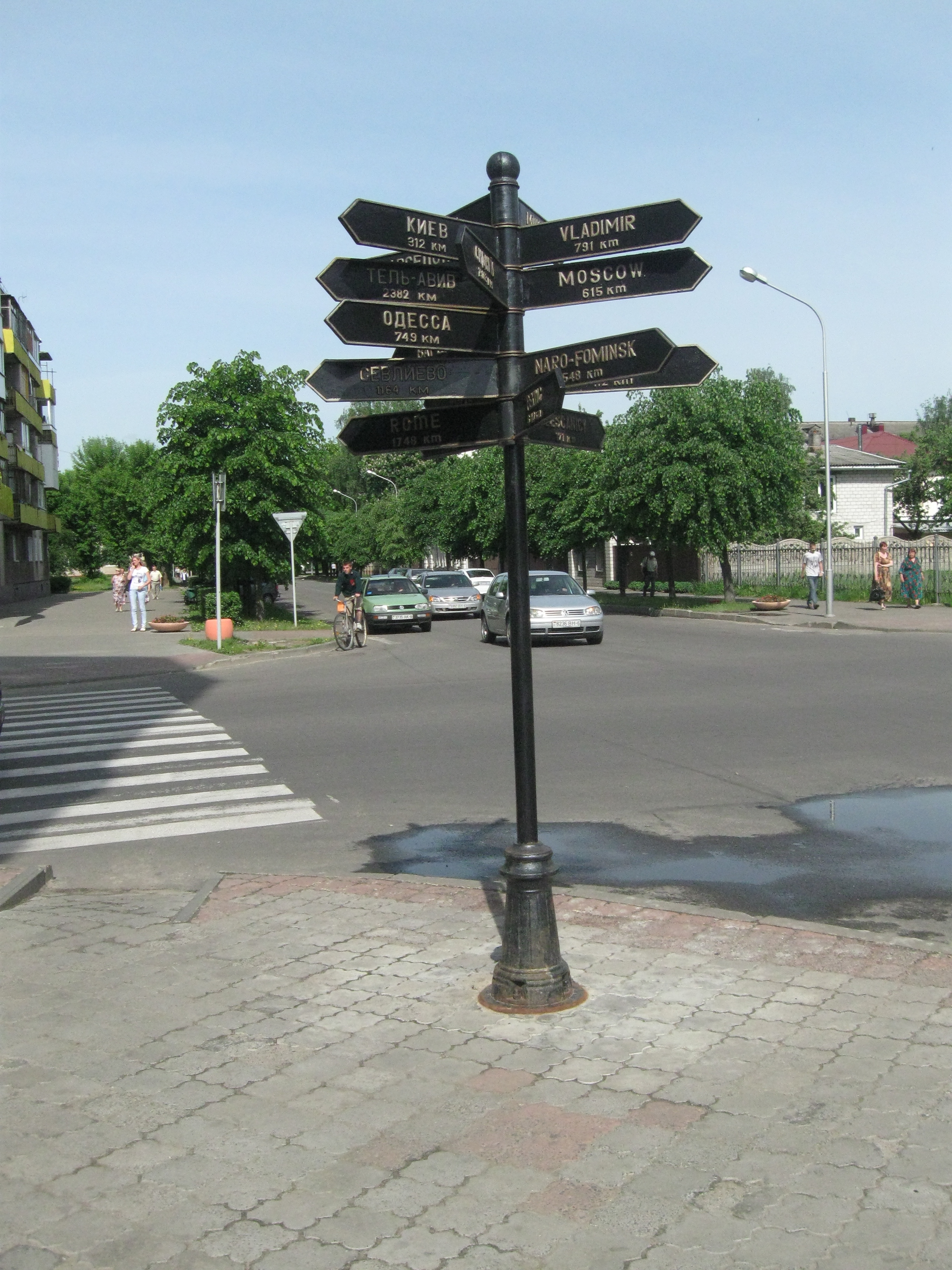 Бобруйск. Указатель на перекрёстке ул. Пушкина/ул.Пролетарская